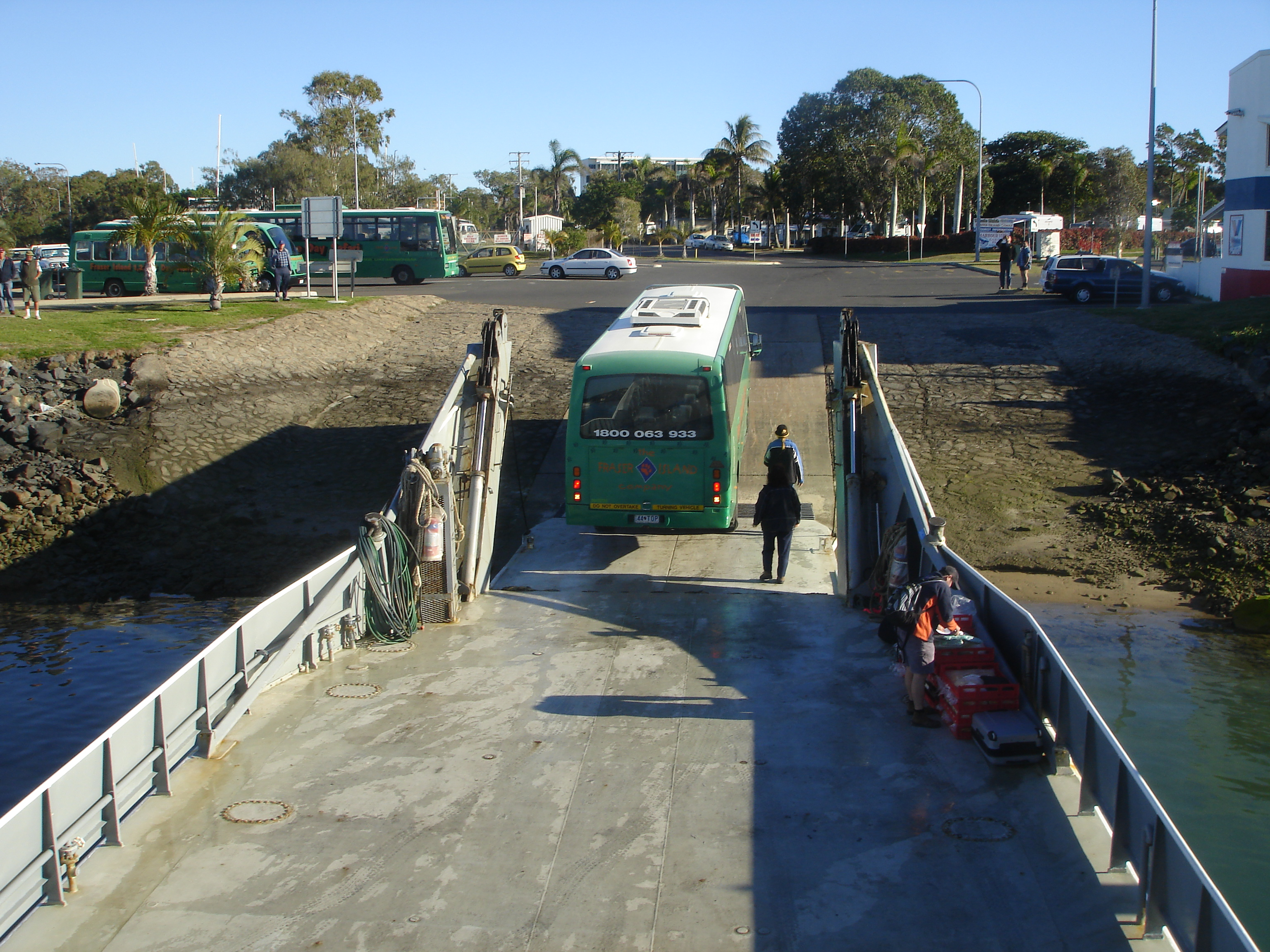 Hervey Bay Fähranleger für eine Überfahrt auf Fraser Island zur Moon Point Road, Queensland, Australien.